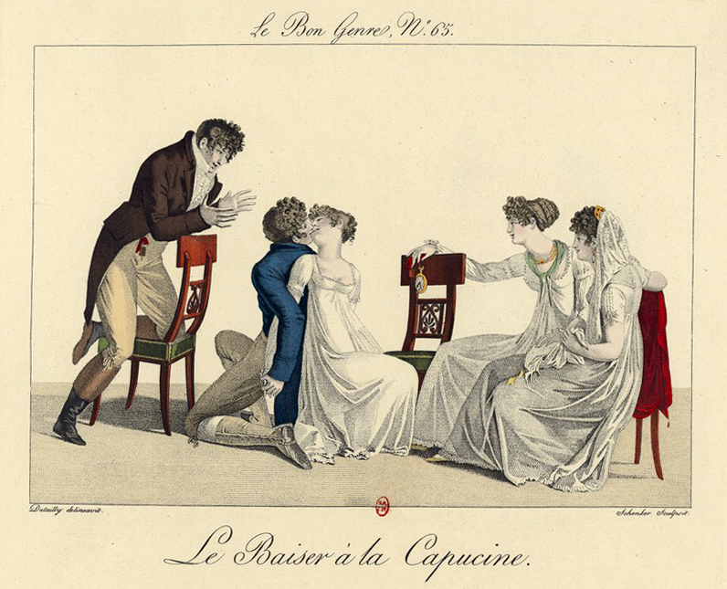 Gravure coloriée à la main de la série Le Bon Genre publiée par Pierre de la Mésangère.